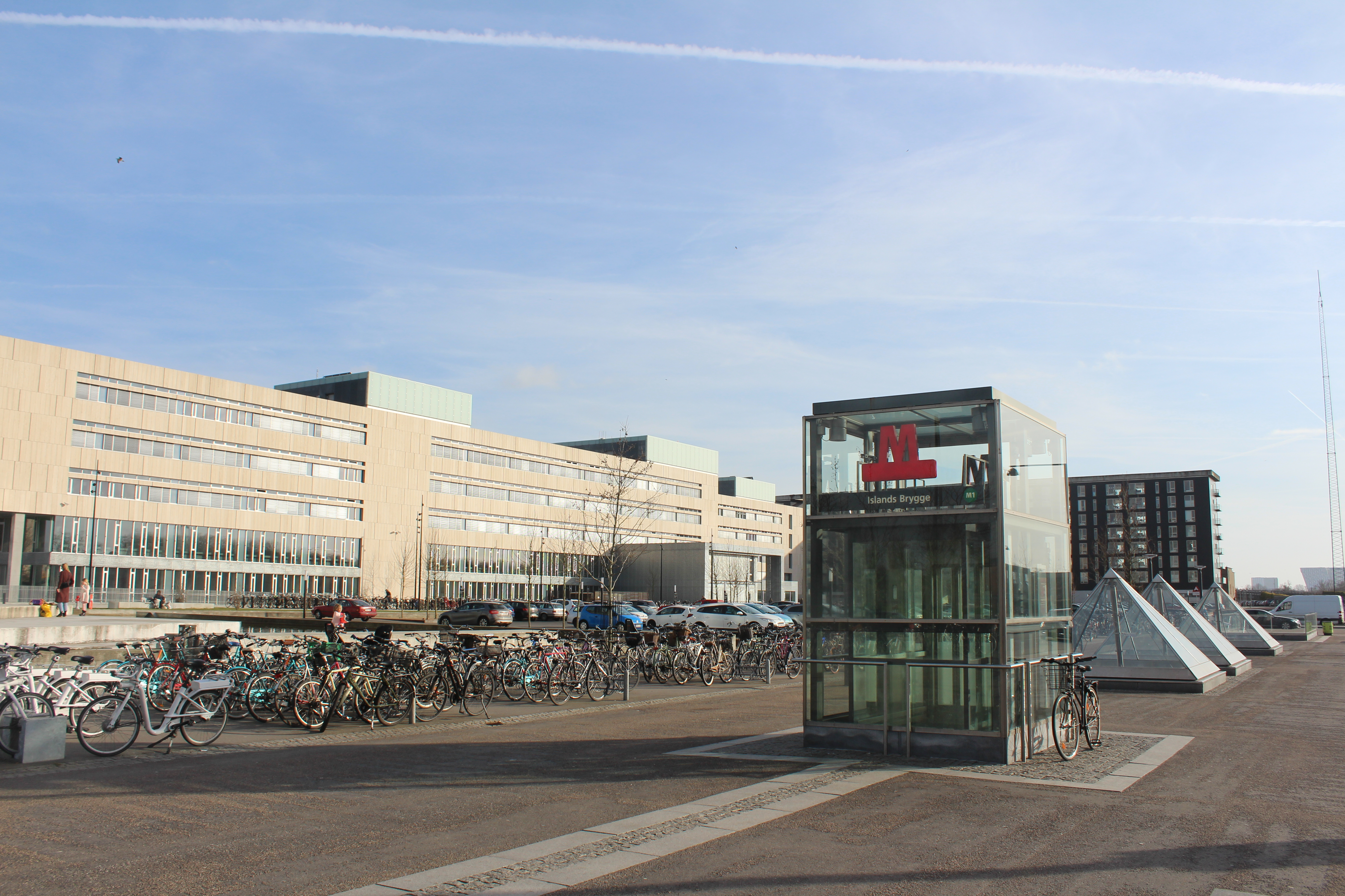 Søndre Campus